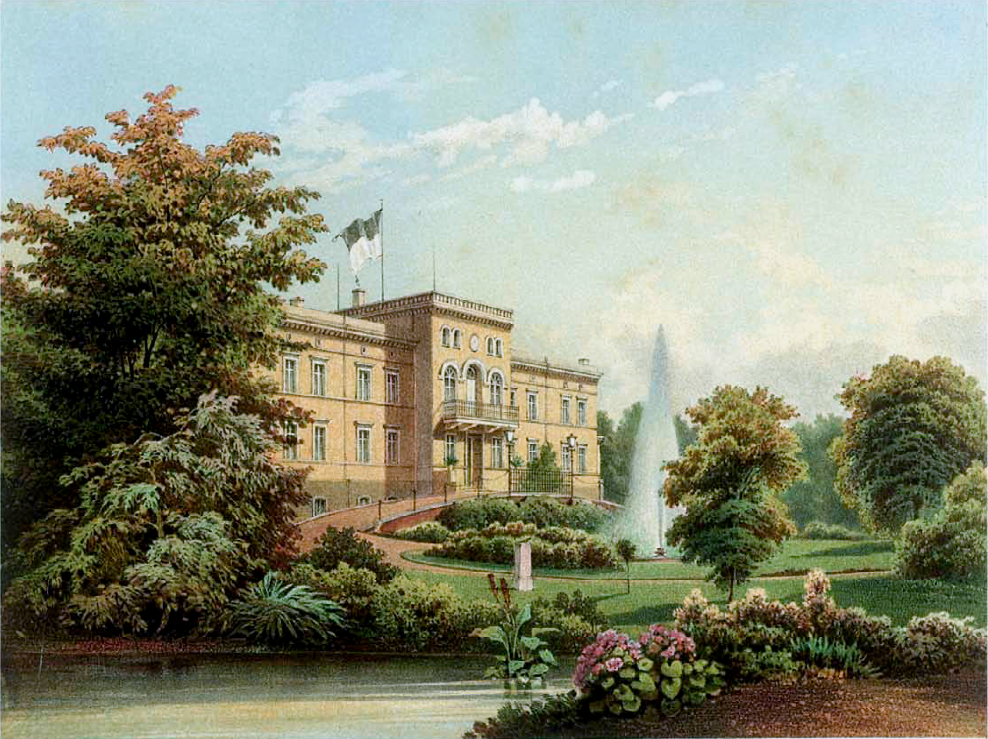 Gutshaus Reinfeld (Regefild), Kreis Belgard